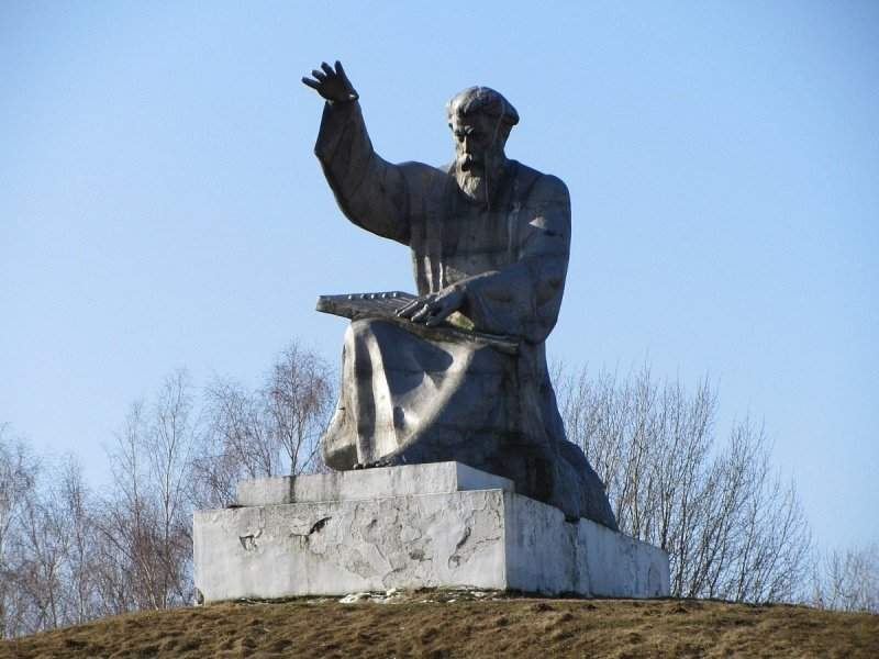 Мемарыял Воінскай Славы ў вёсцы Лудчыцы Быхаўскага раёна Магілёўскай вобласці Беларусі